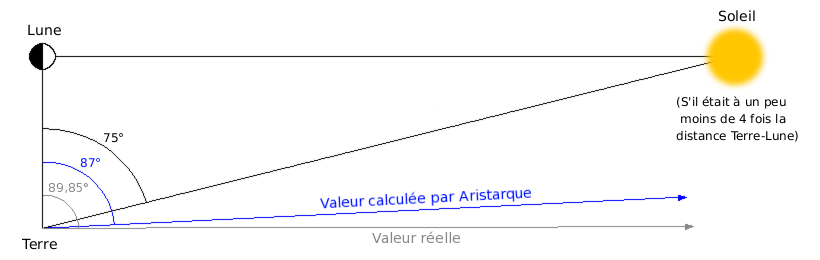 Description : Méthode d'Aristarque de Samos pour calculer la distance Terre-Soleil. Source : Dhenry ; schéma personnel. Licence : Catégorie:Schéma de physique